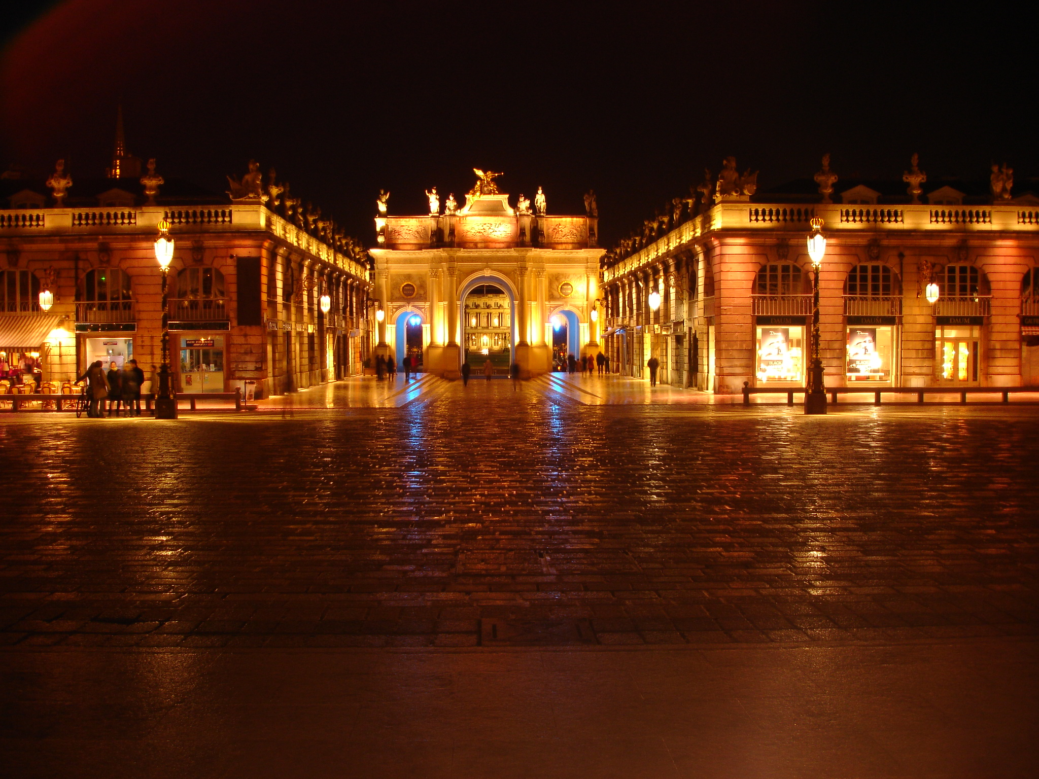 Nancy (54) Place Stanislas de nuit